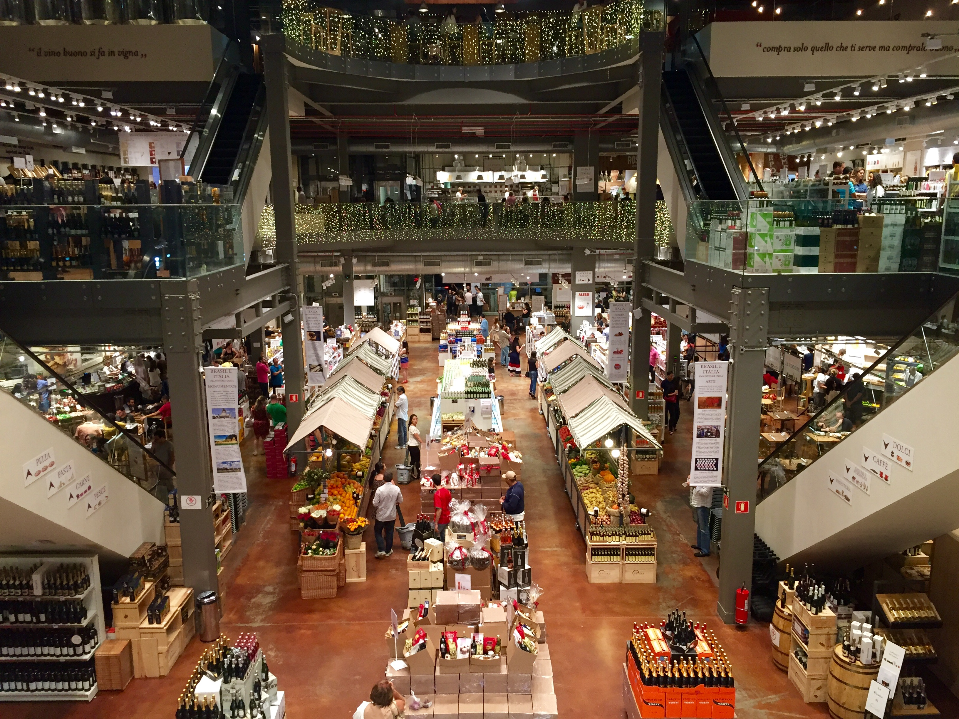 Foto do Eataly Brasil, localizado em São Paulo.